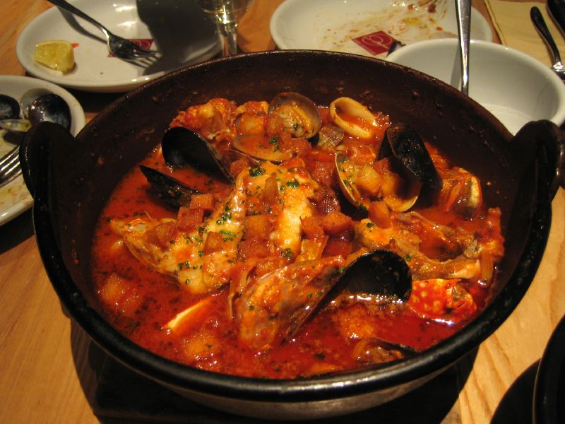 Cioppino à l'italienne